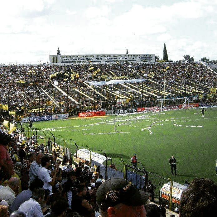 Vista desde la platea Tribuna Norte Estadio Fragata P.Sarmiento